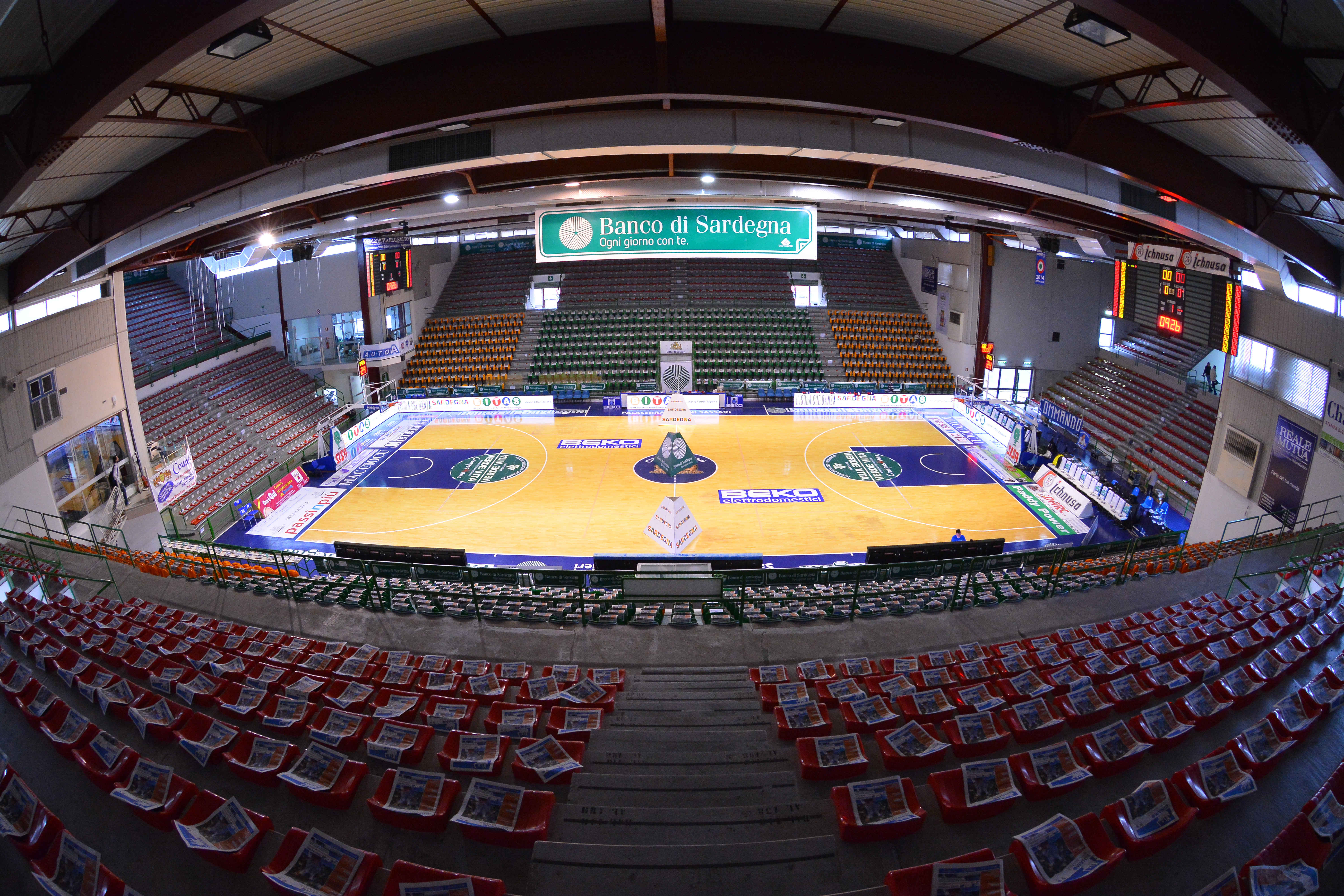 DESCRIZIONE : Campionato 2013/14 Quarti di Finale GARA 1 Dinamo Banco di Sardegna Sassari - Enel Brindisi GIOCATORE : PalaSerradimigni Interno Sassari CATEGORIA : Palazzo Palazzetto Arena Panoramica EVENTO : LegaBasket Serie A Beko Playoff 2013/2014 DATA : 19/05/2014 AUTORE : Agenzia Ciamillo-Castoria / Luigi Canu